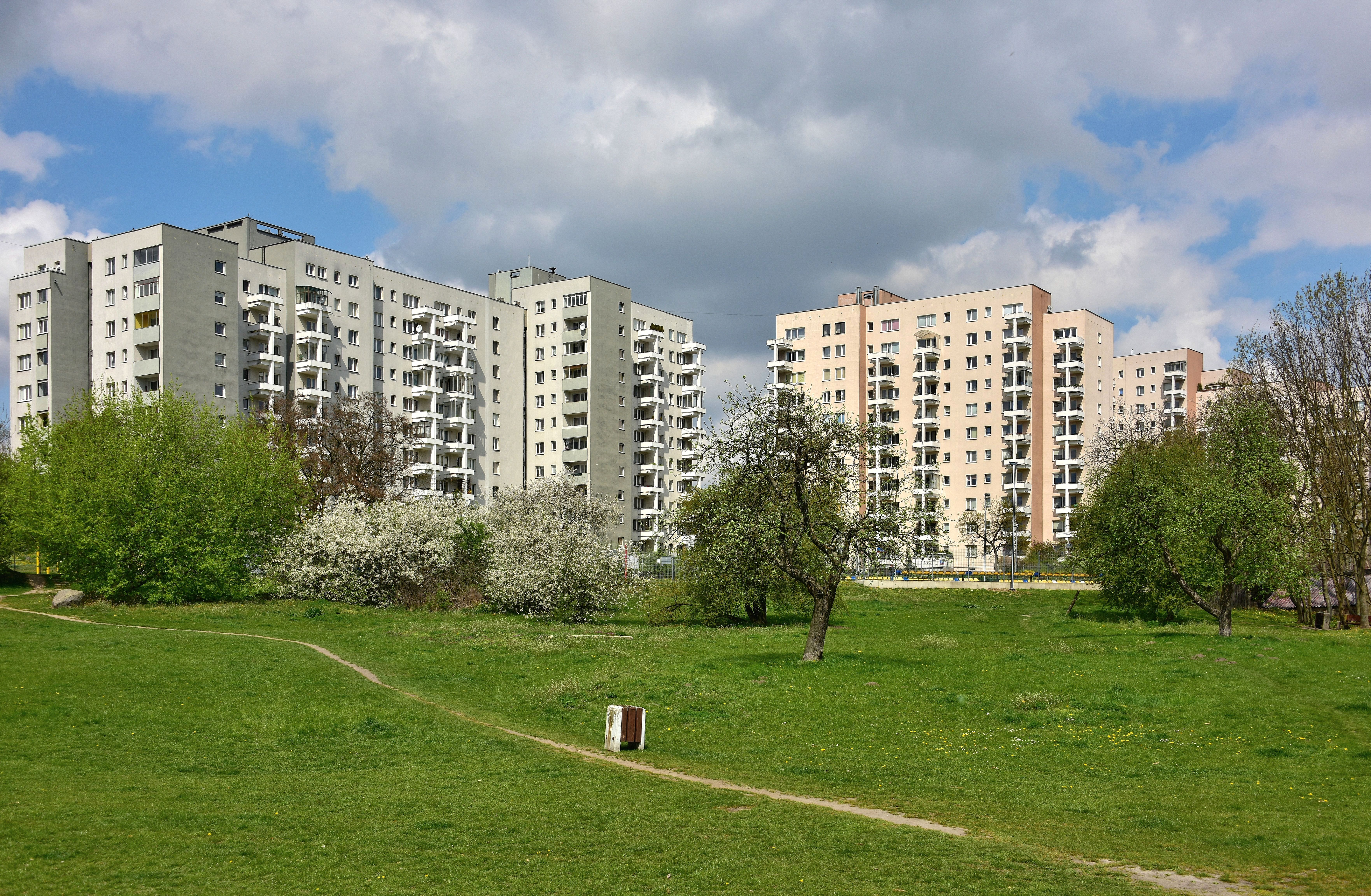 Osiedle Służew nad Dolinką widziane z parku Dolinka Służewska w Warszawie - bloki ul. Noskowskiego 10 i 12